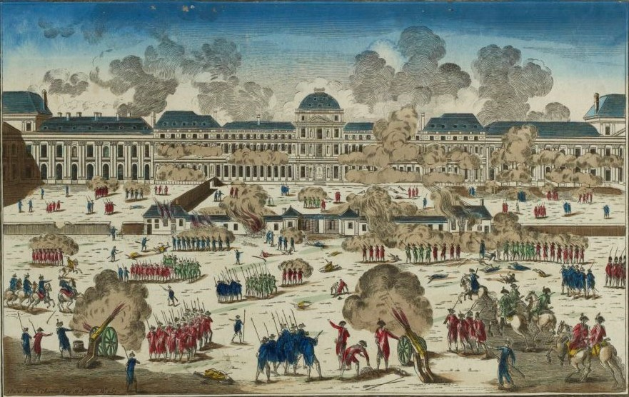 Siège du palais des Tuileries le 10 août 1792. Estampe de J. Chéreau conservée au musée de la Révolution française. (Vizille)